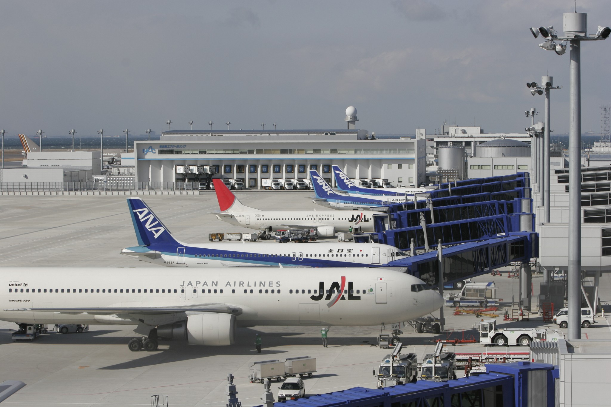 中部国際空港 (愛知県常滑市セントレア)